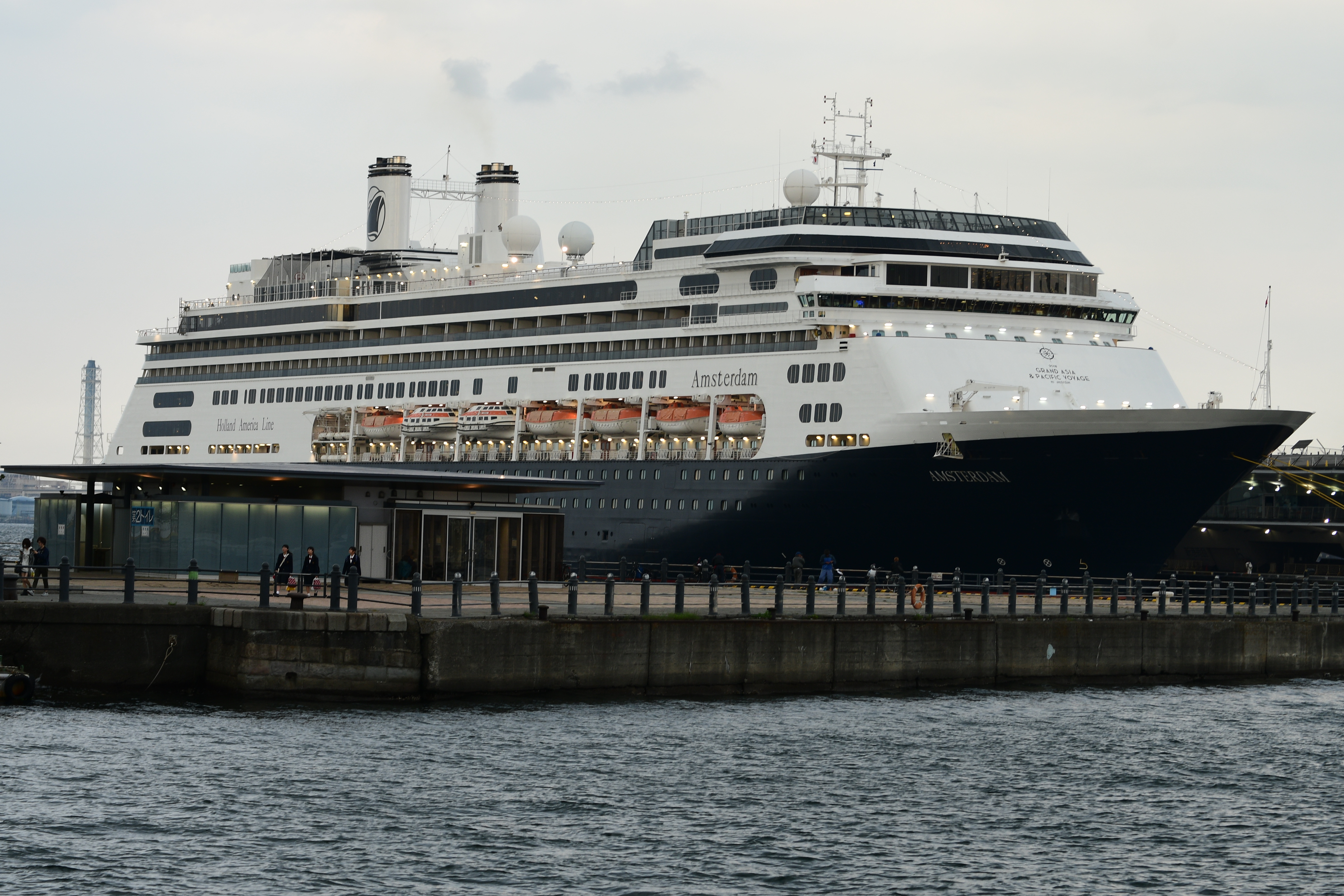 横浜大さん橋国際客船ターミナルに停泊中のアムステルダム